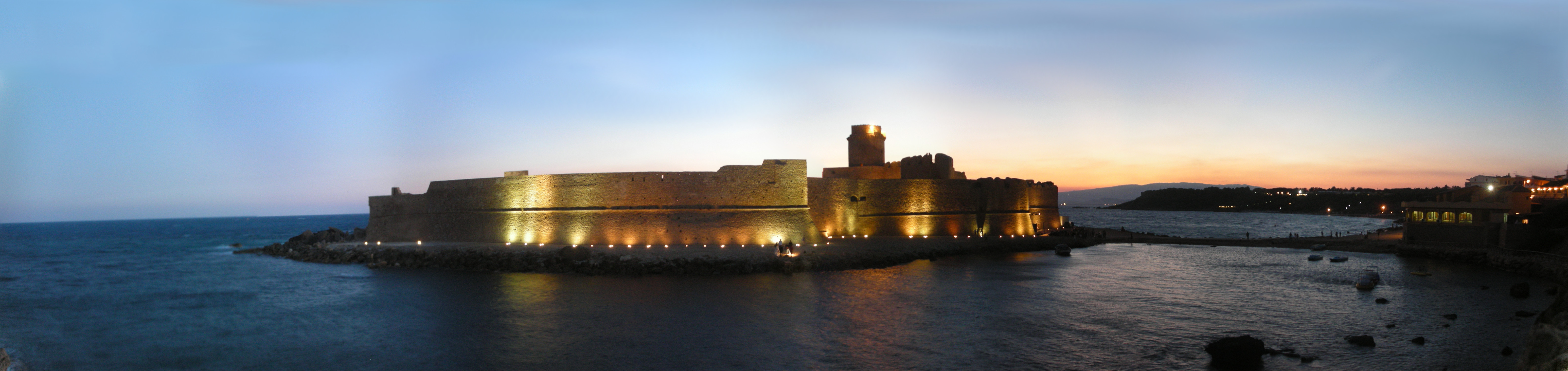 La fortezza di Le Castella di sera